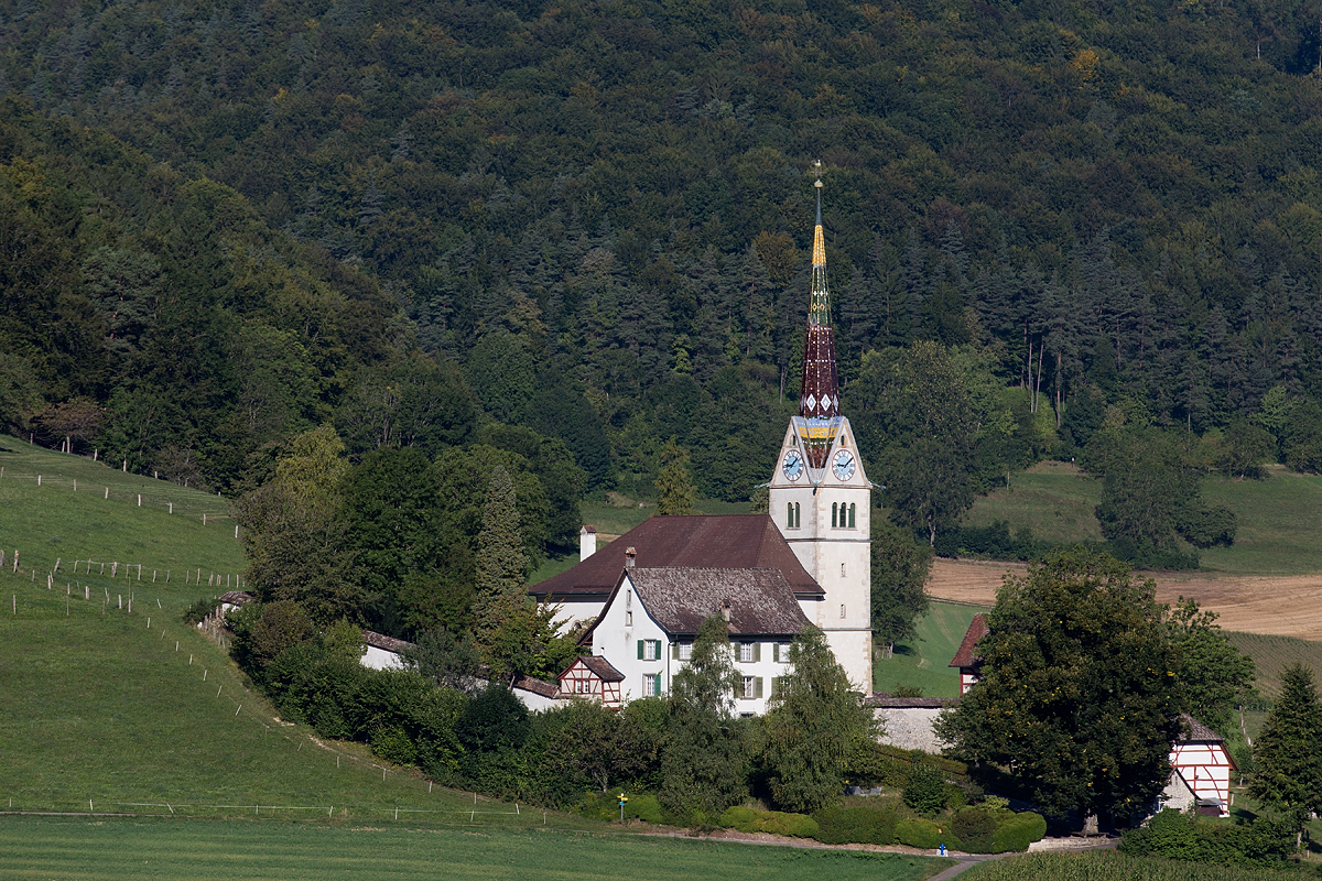 Reformierte Kirche mit Pfarrhaus, Pfarrscheune und anderen Nebengebäuden in Merishausen (SH)